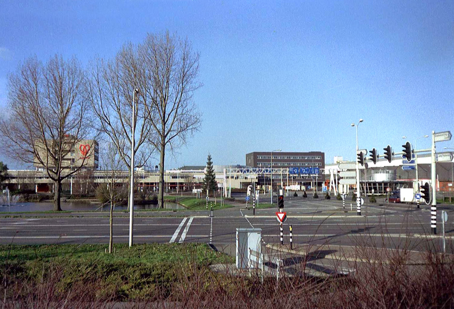 Afbeelding oorspronkelijk afkomstig van dezelfde Wiki pagina. Foto is gecorrigeerd op scheve horizon en contrast.